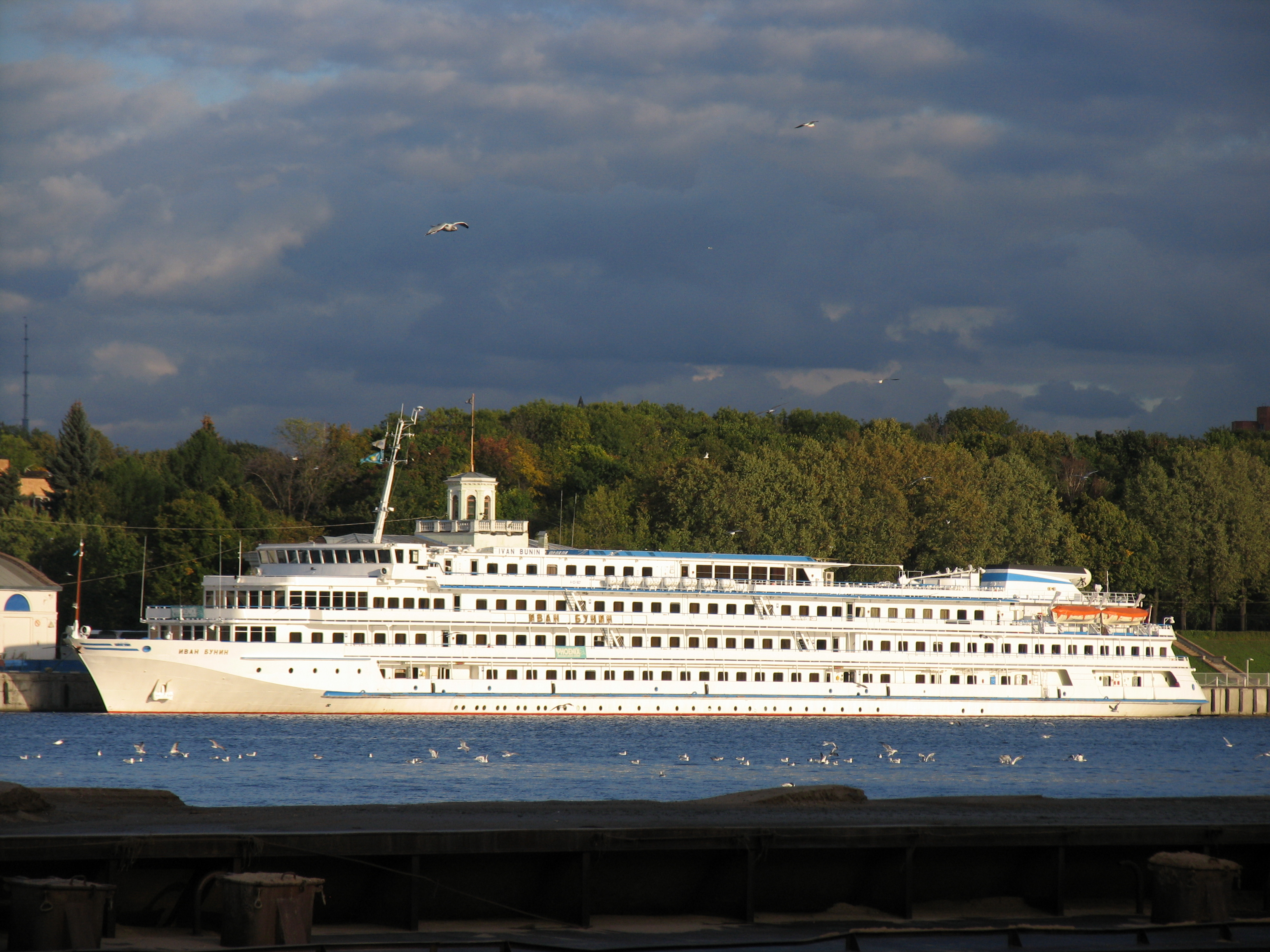 Речное круизное судно "Иван Бунин" в Северном речном порту, Москва.